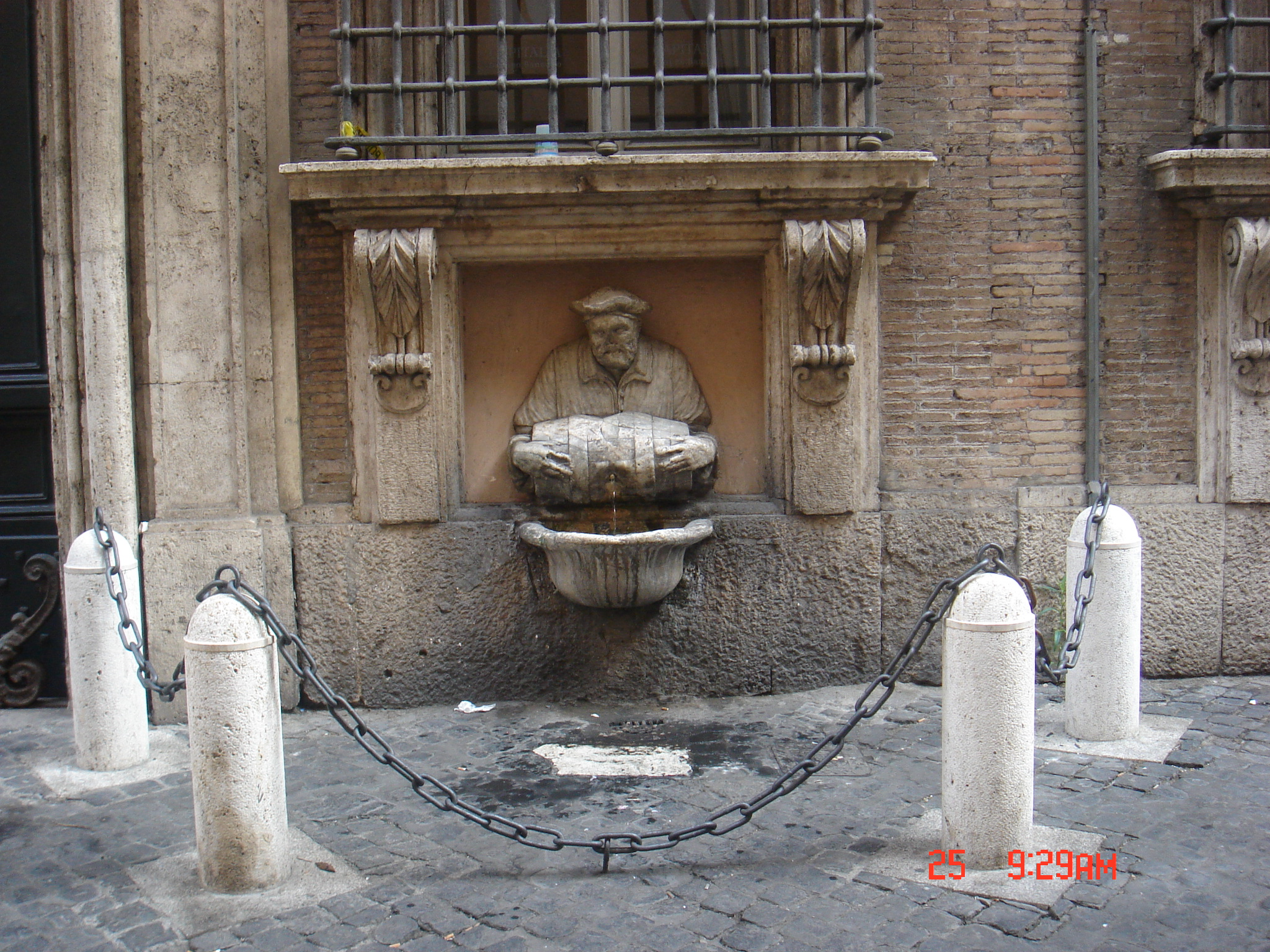 Roma, fontana del Facchino a via Lata, sul fianco di palazzo de Carolis.